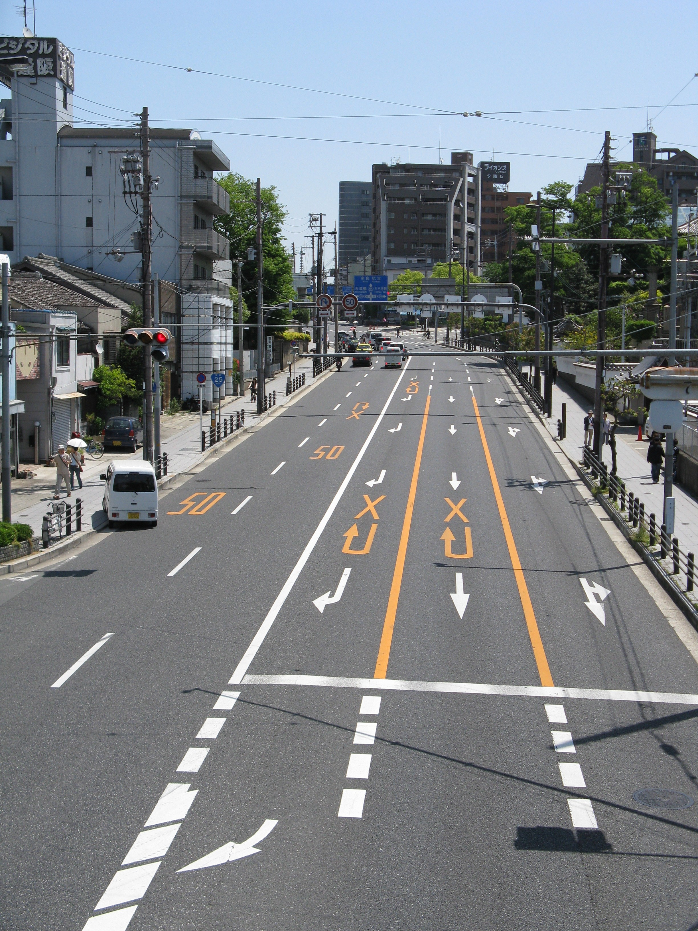 逢坂（天王寺七坂のひとつ）